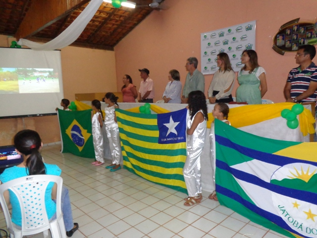 Bandeira de Jatobá do Piauí em cerimônia municipal.